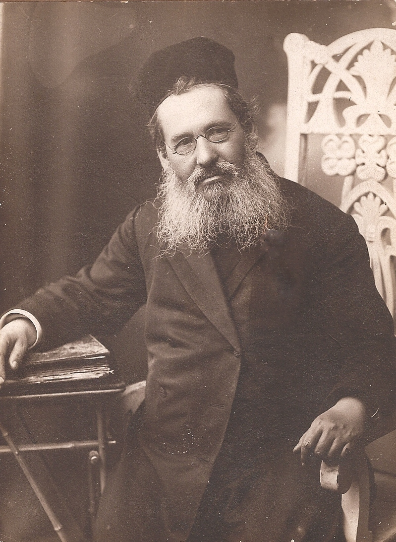 תמונתו של הרב דוד טבל קצנלנבוגן משנת 1911